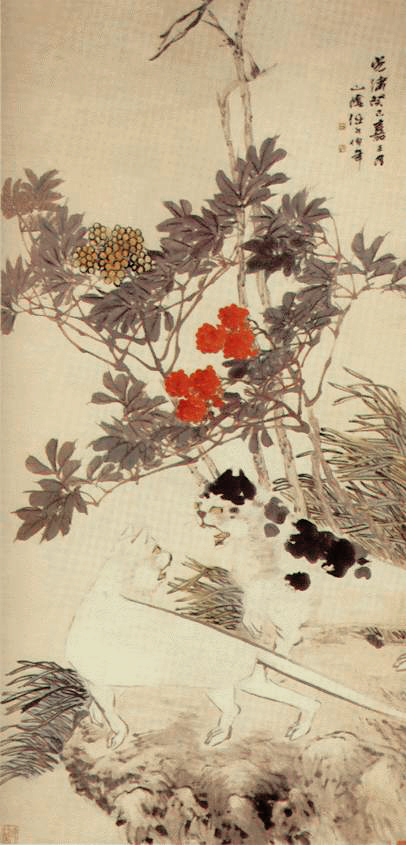 任伯年作品